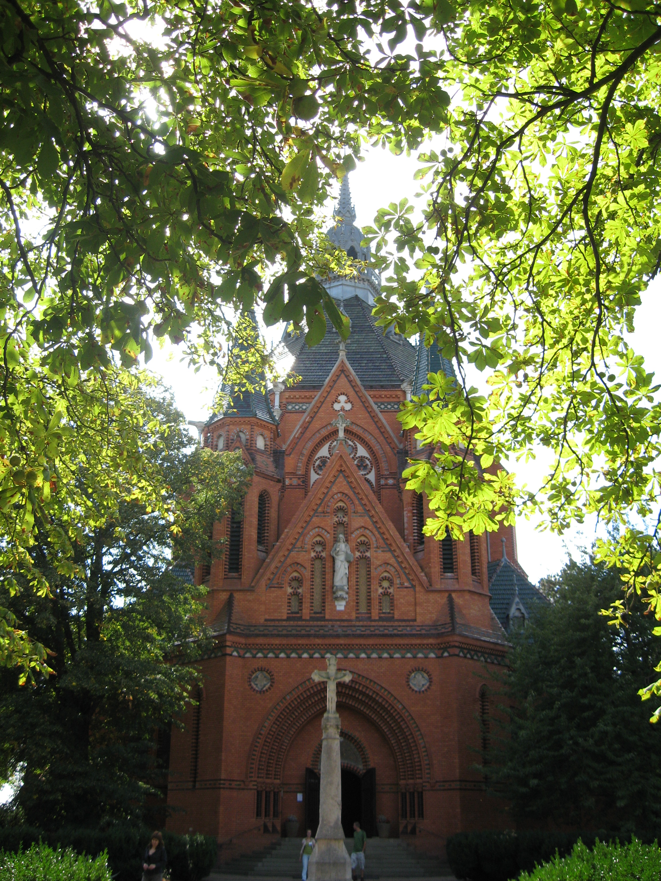 Kostel Navštívení Panny Marie v Poštorné